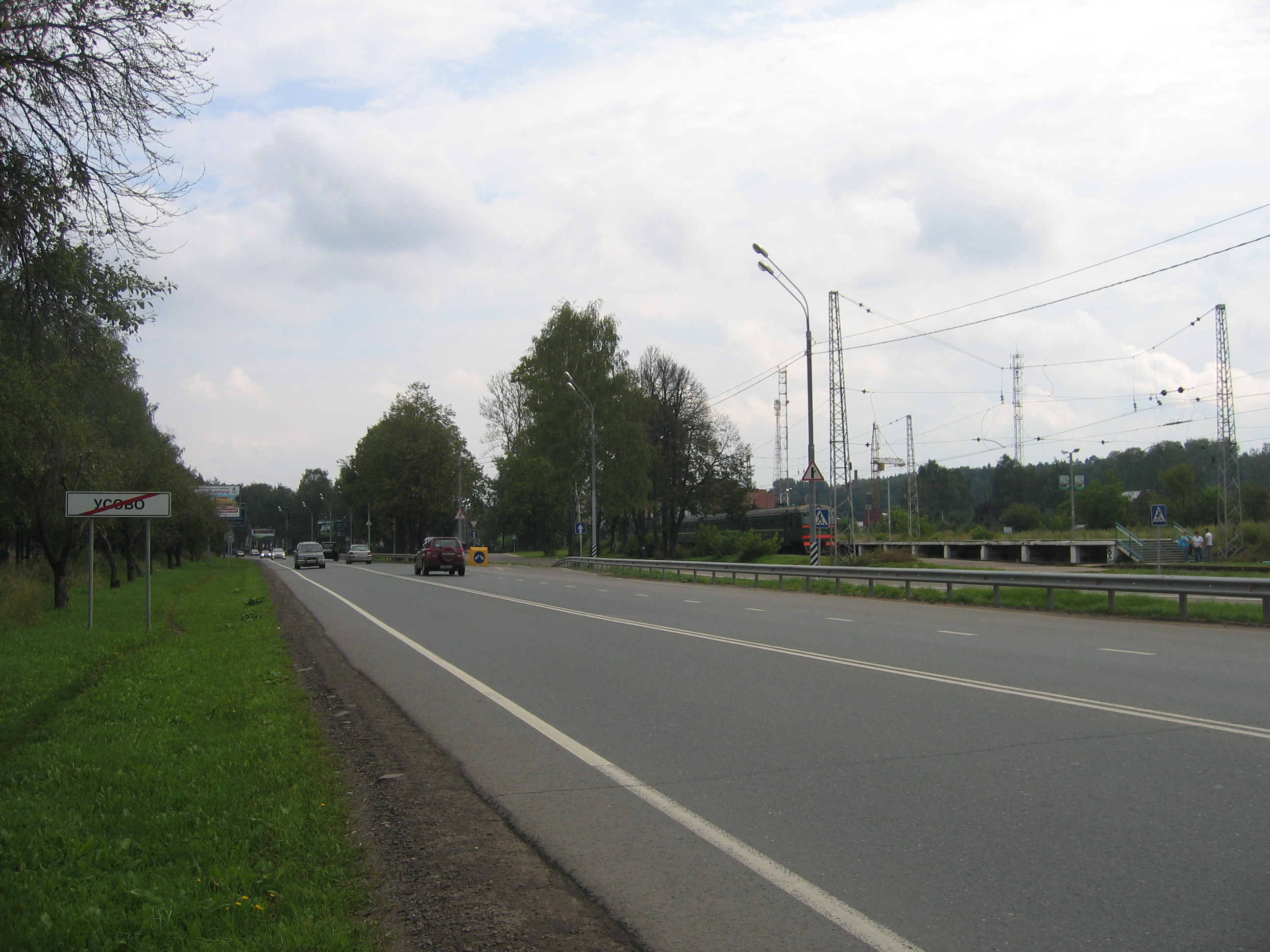 Die Landstraße „Rubljowka“ in Höhe von Ussowo